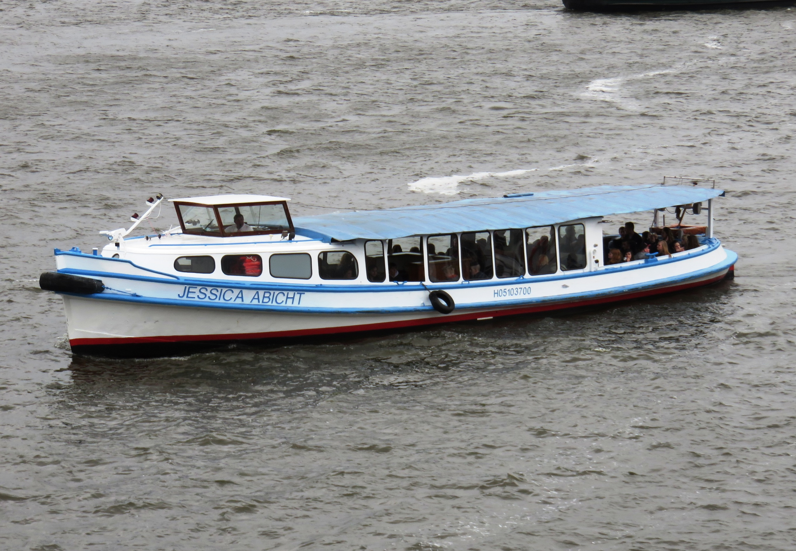 Hamburger Hafenbarkasse Jessica Abicht im Niederhafen